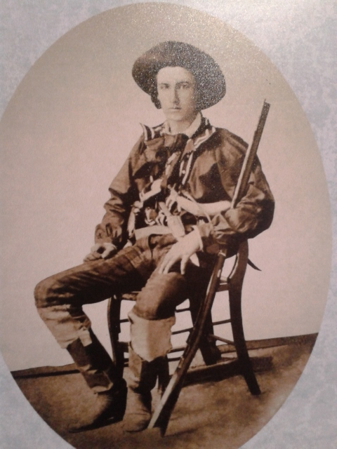 Fotografía de 1856 que retrata a un filibustero. Autor desconocido. Museo Histórico-Cultural Juan Santamaría, Alajuela, Cota Rica.